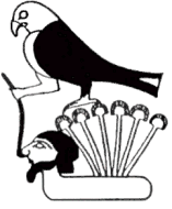 Kritiikki Ry:n tunnus